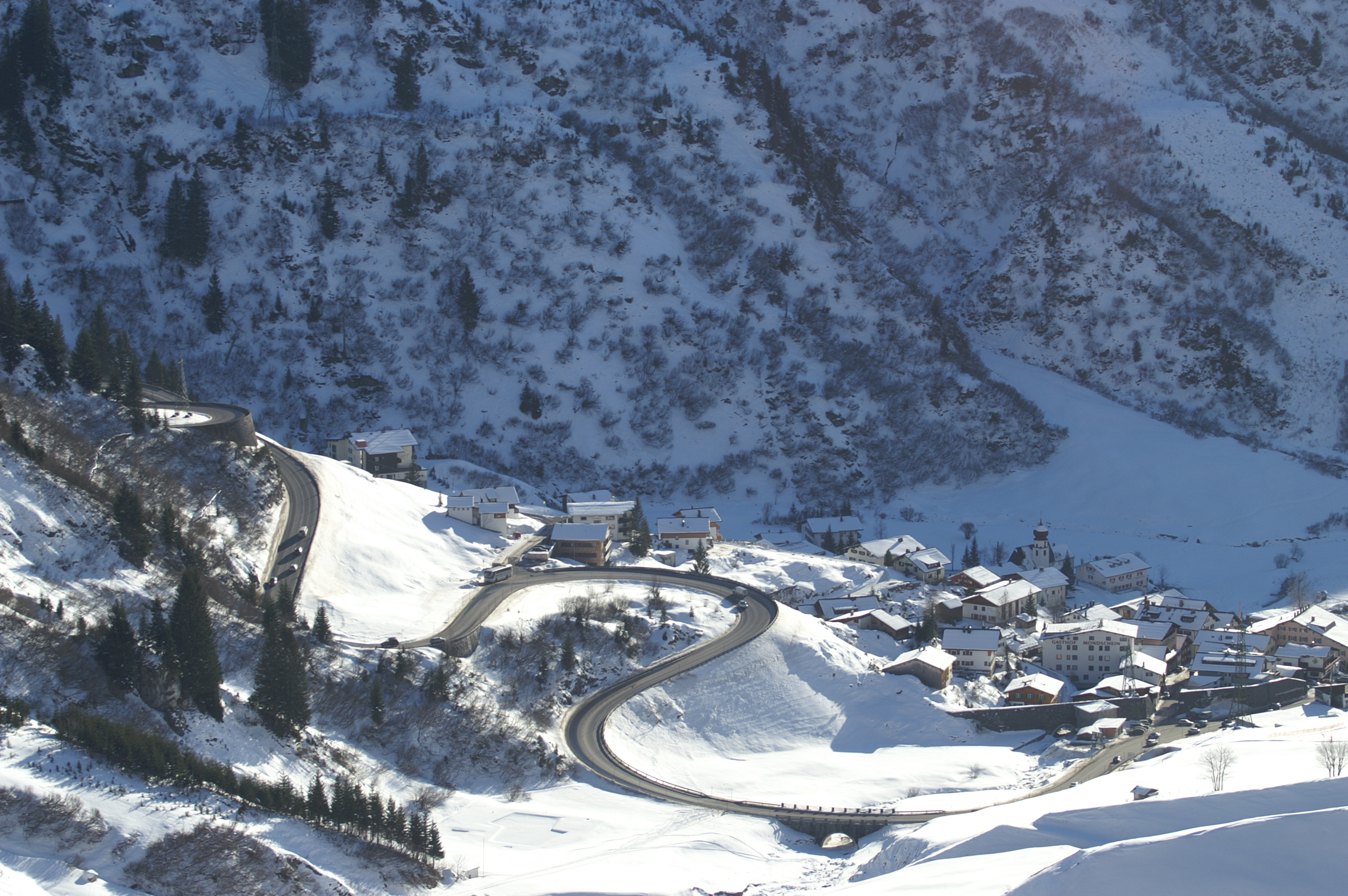 Stuben vom Flexenpass gesehen